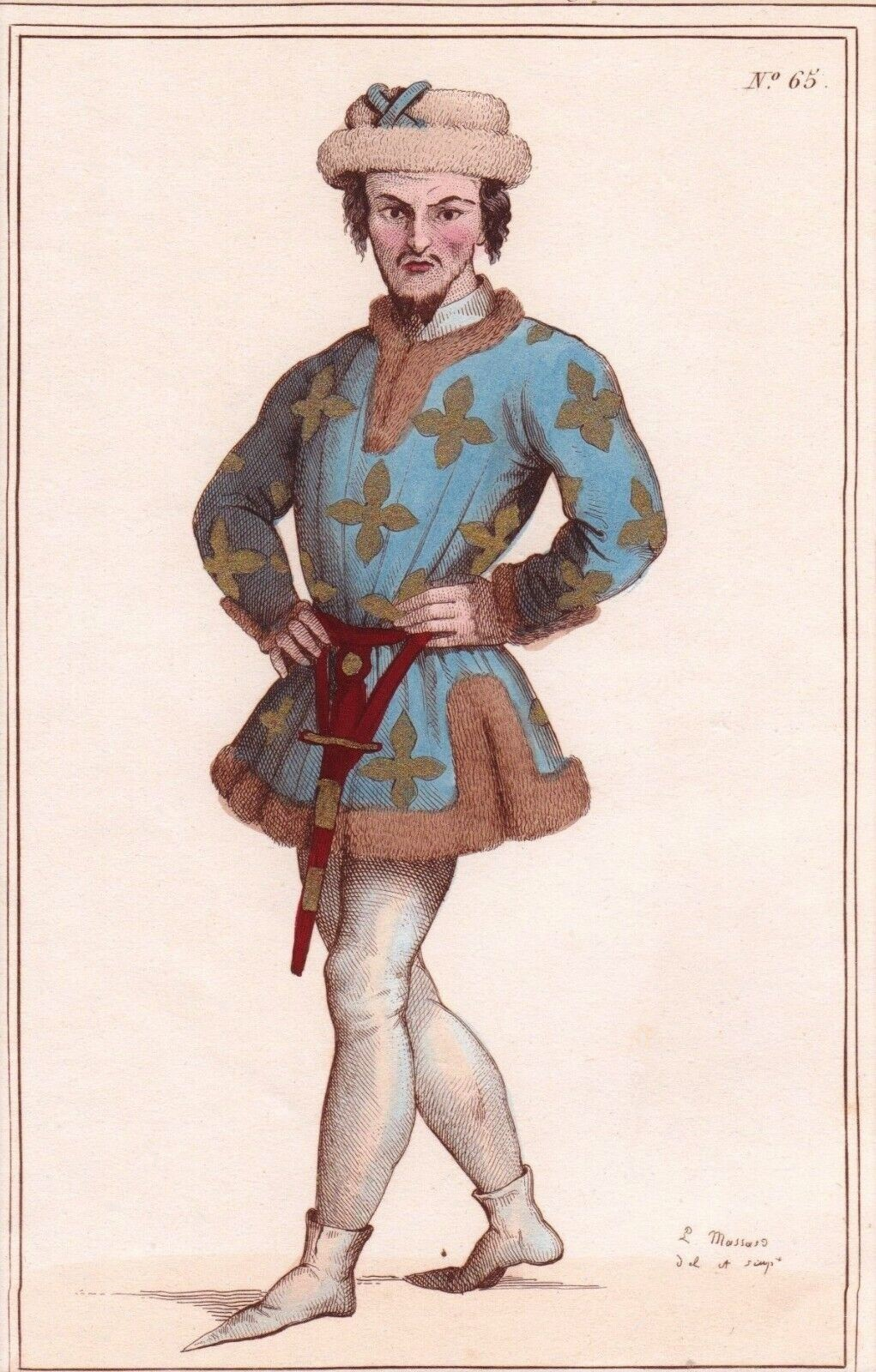 Gilles de Laval Seigneur de Retz, planche en couleurs n° LXV extraite de l'ouvrage de Paul Lacroix, Costumes historiques de la France d'après les monuments les plus authentiques... avec un texte descriptif, précédé de l'Histoire de la vie privée des Français... et suivi d'un Recueil curieux de pièces originales, rares ou inédites, en prose et en vers, sur le costume et les révolutions de la mode en France, par le bibliophile Jacob, tome III, Paris, Administration de librairie, 1852.